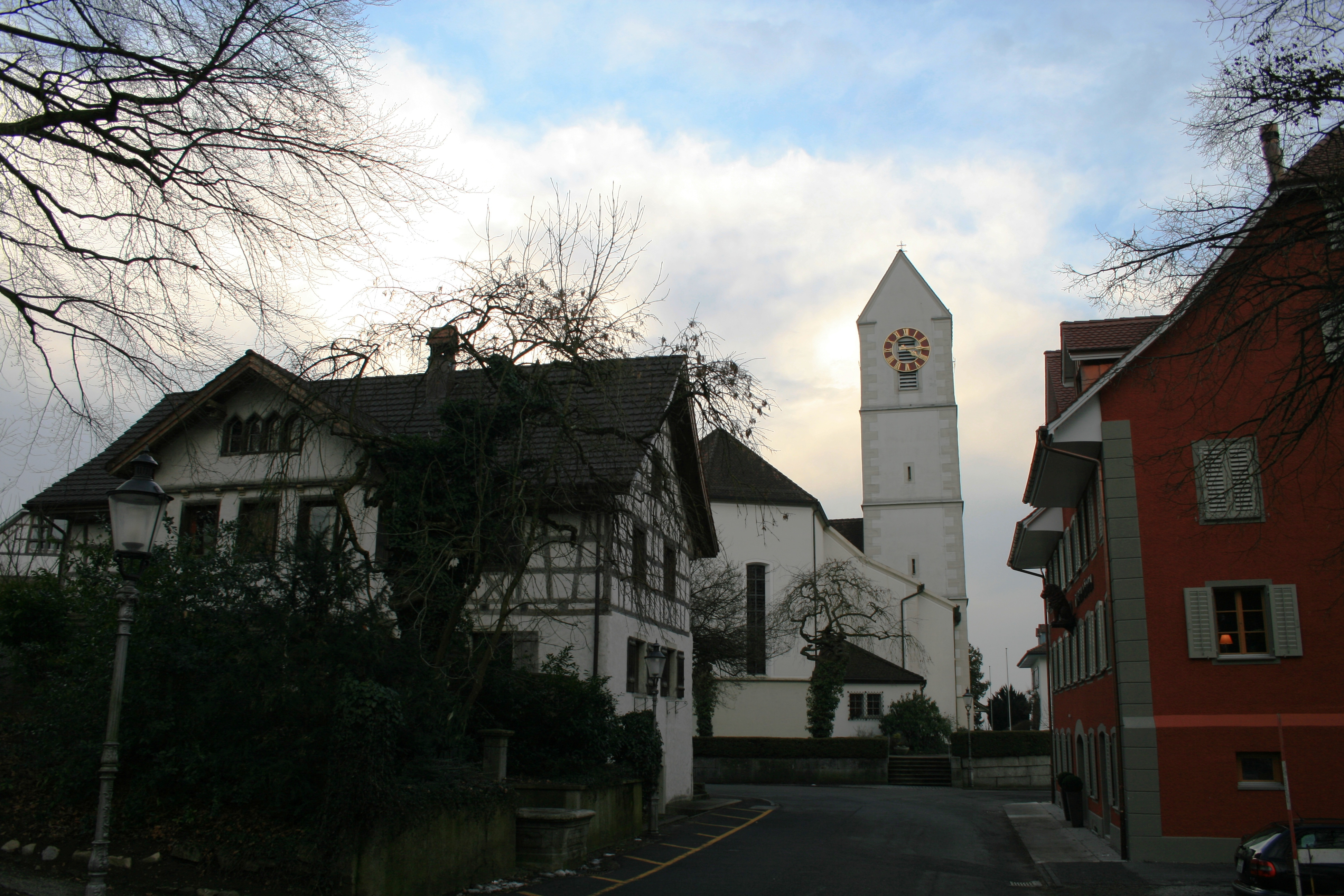 Röm,-kath. Kirche Oberrohrdorf, Schweiz